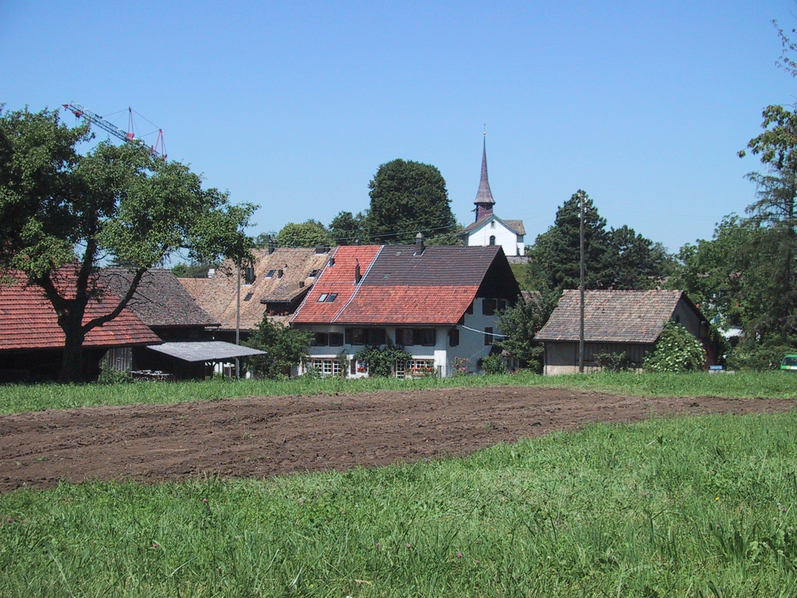 Ansicht von Witikon, Quartier der Stadt Zürich im Kreis 7